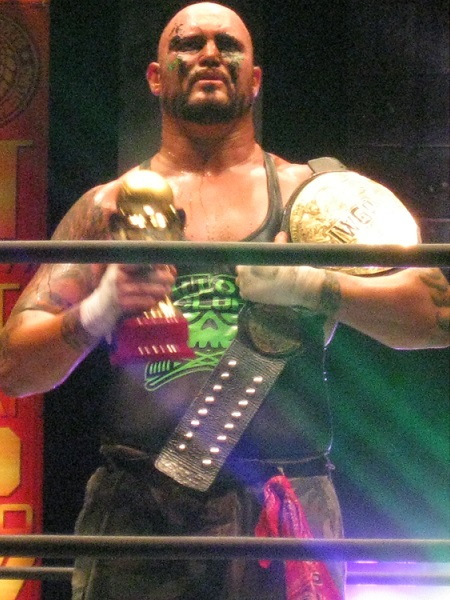 2014年9月21日 ワールド記念ホール「DESTRUCTION in KOBE」 ドク・ギャローズ